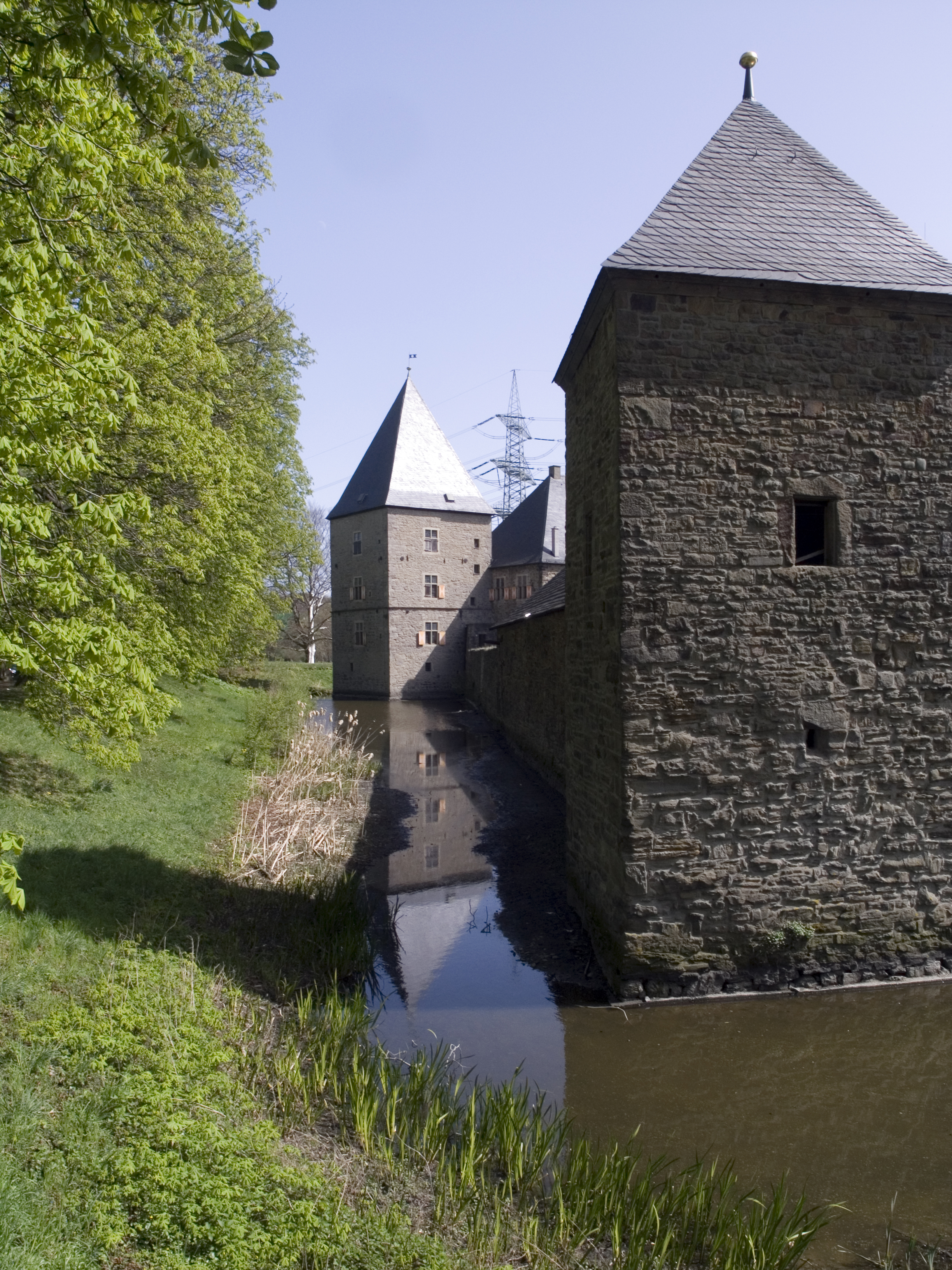 Северный Рейн - Вестфалия, Хаттинген. Замок Кемнаде